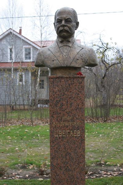 Памятник И. В. Цветаеву в Тарусе. Работа скульптора Александра Казачка. Октябрь 2010 года